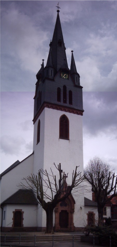 Katholische Kirche St. Markus in Mühleim am Main